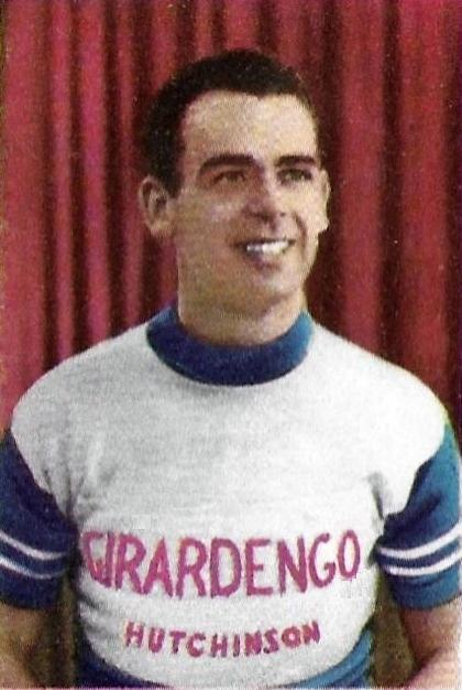 Rik Van Steenbergen en 1967 - Campioni dello Sport 1967-1968, n°289.